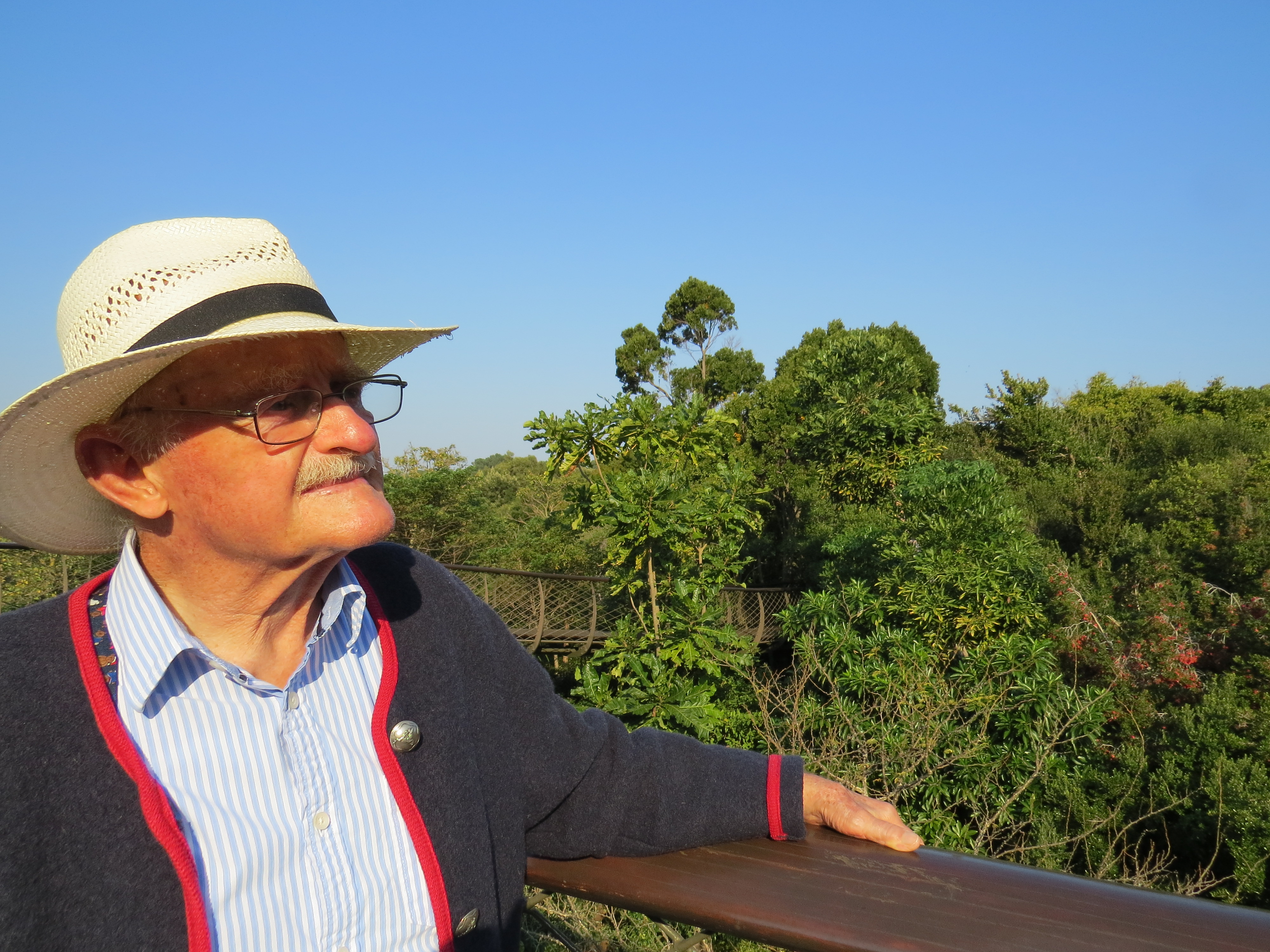 Hans Breuer vor seinem Haus in Westkap